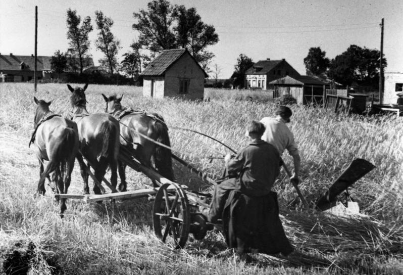 Bei Oranienburg, 3 Pferde vor der Mähmaschine gespannt Zentralbild/Dreyer Juli 1949. Roggenernte im Kreis Oranienburg, Bezirk Potsdam. Die Mähmaschine ist ein für die Getreidemahd umgebauter Grasmäher mit Handablage.